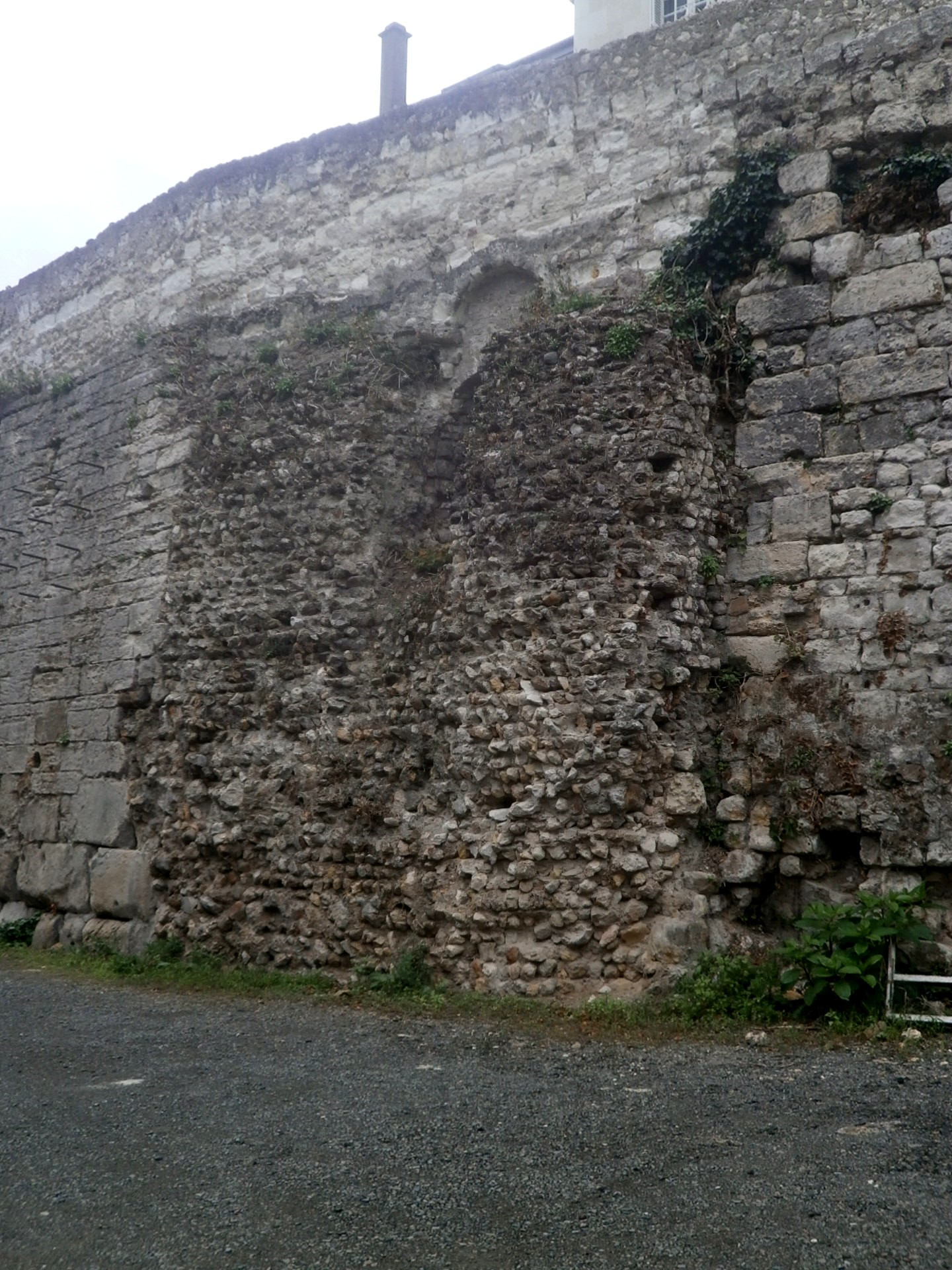 Vestiges de l'amphithéâtre de Tours (tour de fortification ou escalier extérieur)